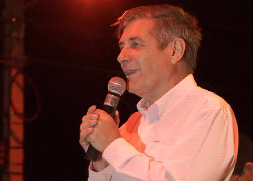 Dom Luiz Cappio em Canudos